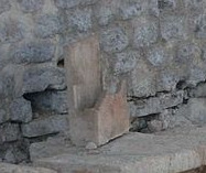 Cassinomagus, commune de Chassenon, Charente, France S-O. Gros fragment de tubulus qui a servi à transporter de l'air chaud - soit pour le répartir, soit pour l'évacuer. (Ce tubulus ne porte pas de traces noires de fumée à l'intérieur, il n'a donc pas servi à évacuer les fumées d'un four.) Thermes classés MH. .